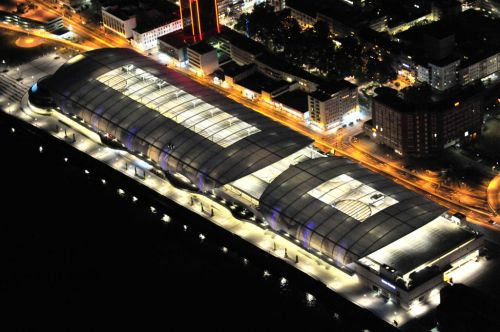 Ludwigshafen 05.05.2011 Nachtaufnahme: Das Einkaufszentrum Rhein-Galerie in Ludwigshafen. In der Einkaufspassage sind zahlreiche Fachgeschäfte, Gastronomiebetriebe und Dienstleister zu finden. Dieses Projekt wurde von der Union Investment Real Estate GmbH realisiert, von der ZÜBLIN AG errichtet und von der ECE Unternehmensgruppe betrieben. Night shot: View to the new shopping-center Rhein-galerie in Ludwigshafen. / /